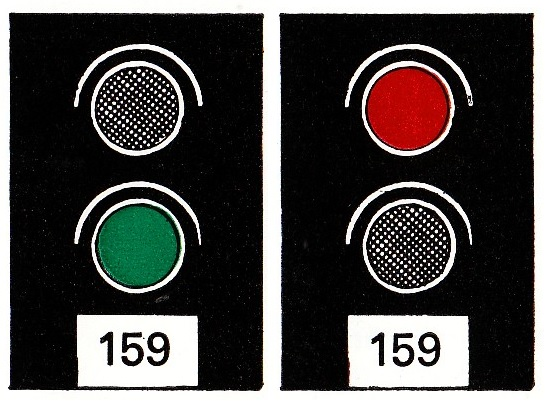 Wiener Elektrische Stadtbahn, Hauptsignal 159